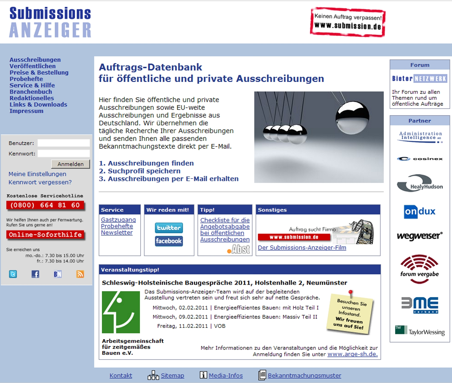 Screenshot des Submissions-Anzeigers im Internet